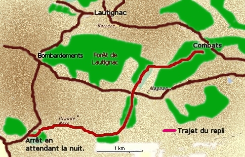 Plan personnel, il ne provient pas de Mappy ni de viamichelin qui situent le village de Lautignac a 2 km de la réalité. Bouchard.daniel 10 décembre 2006 à 21:29 (CET)